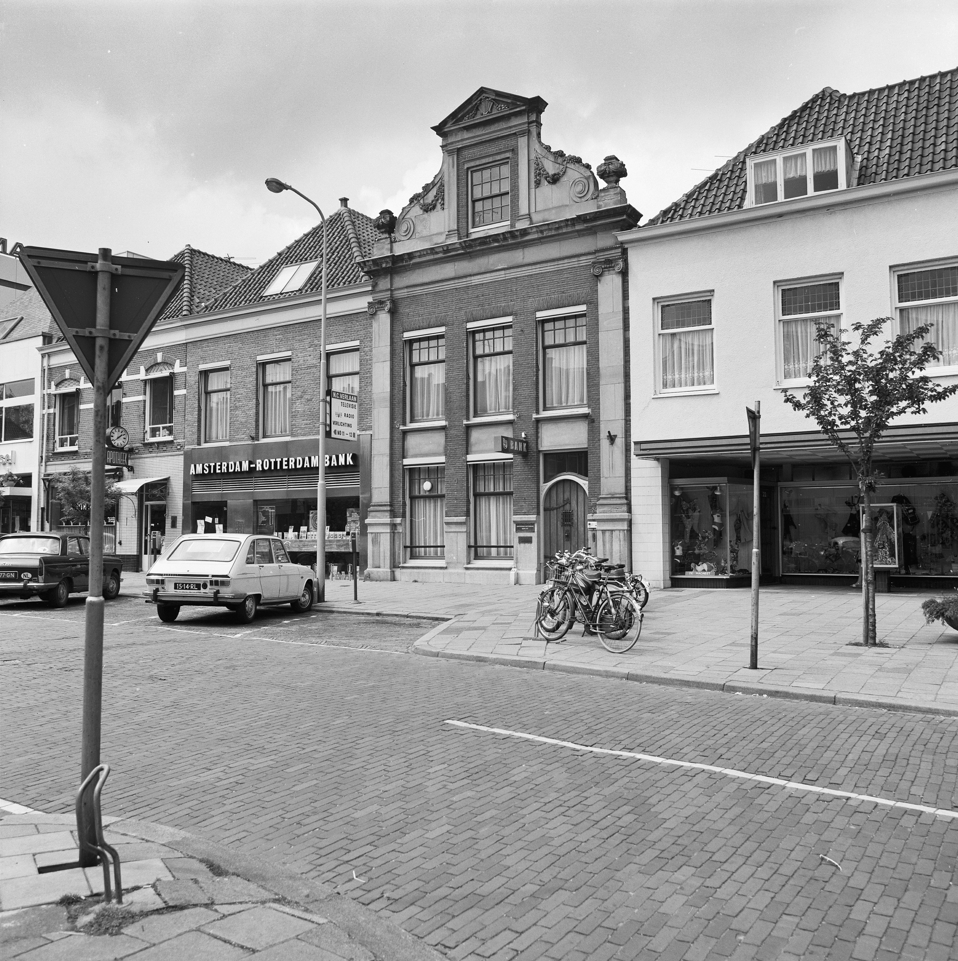 voorgevel